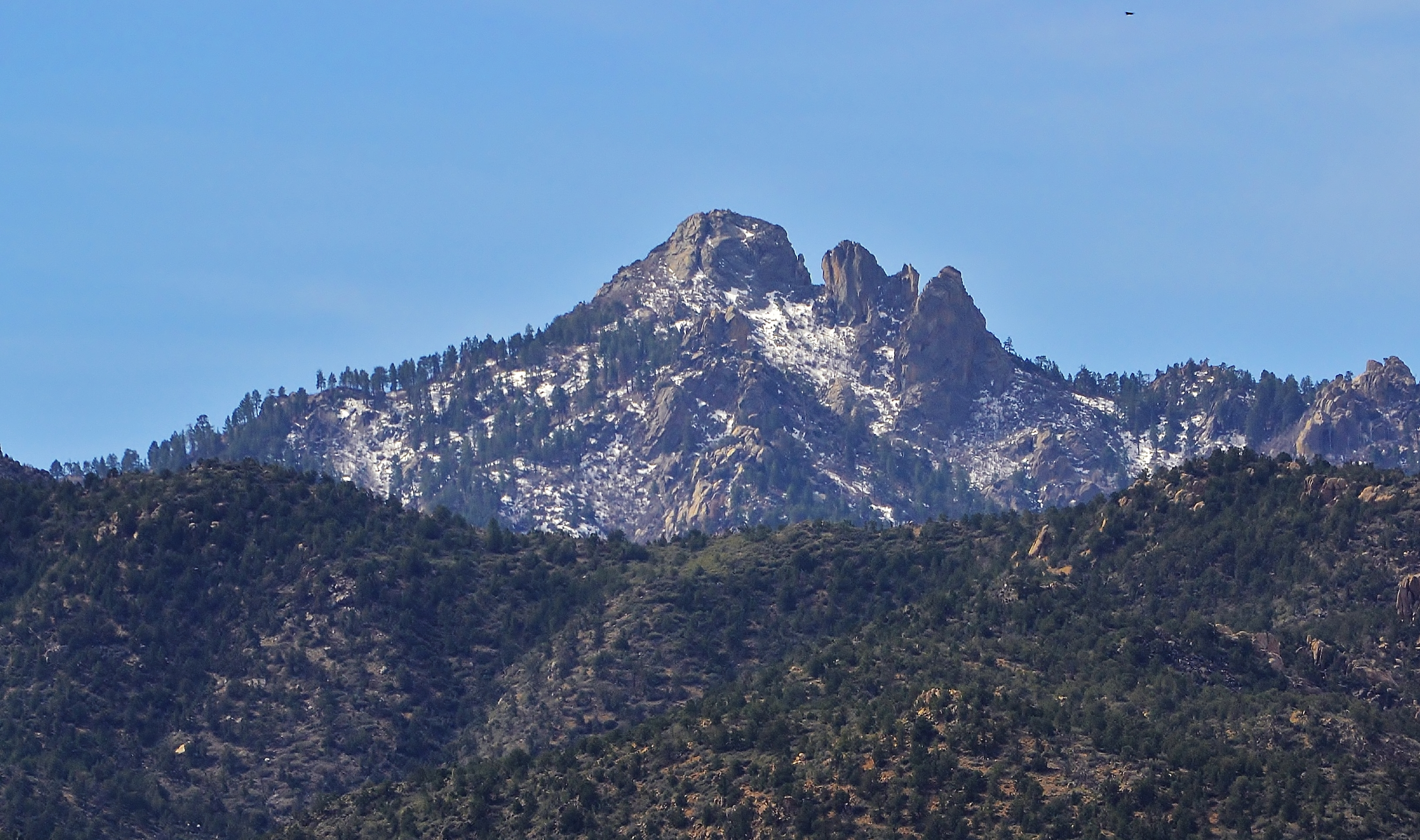 Mt. Hualapai Peak